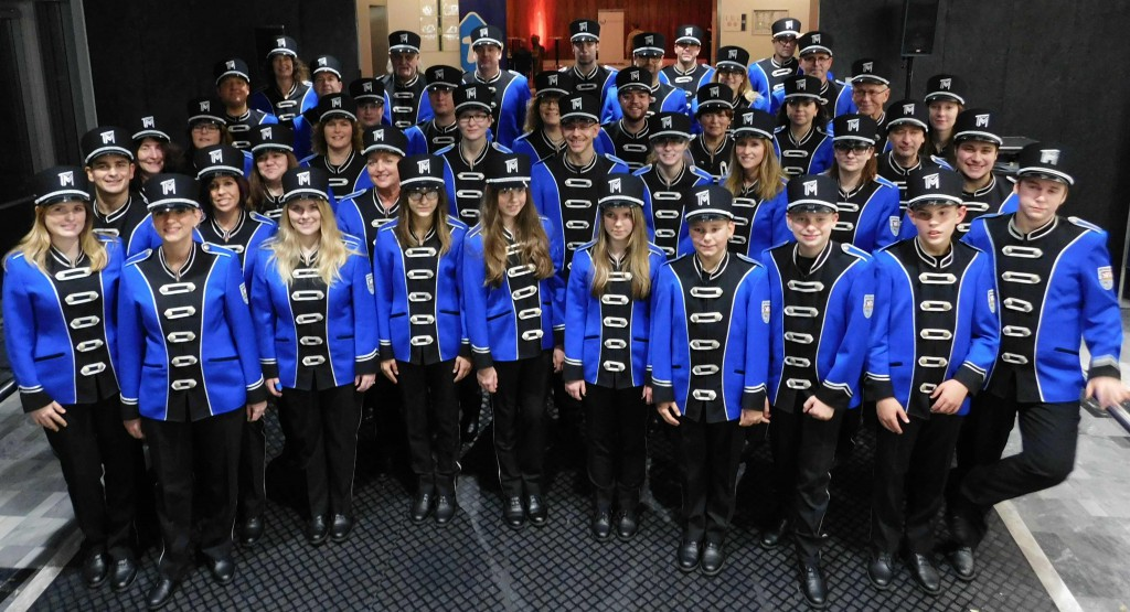 Gruppen Spielleuteorchester TV 1901 Michelbach e.V.